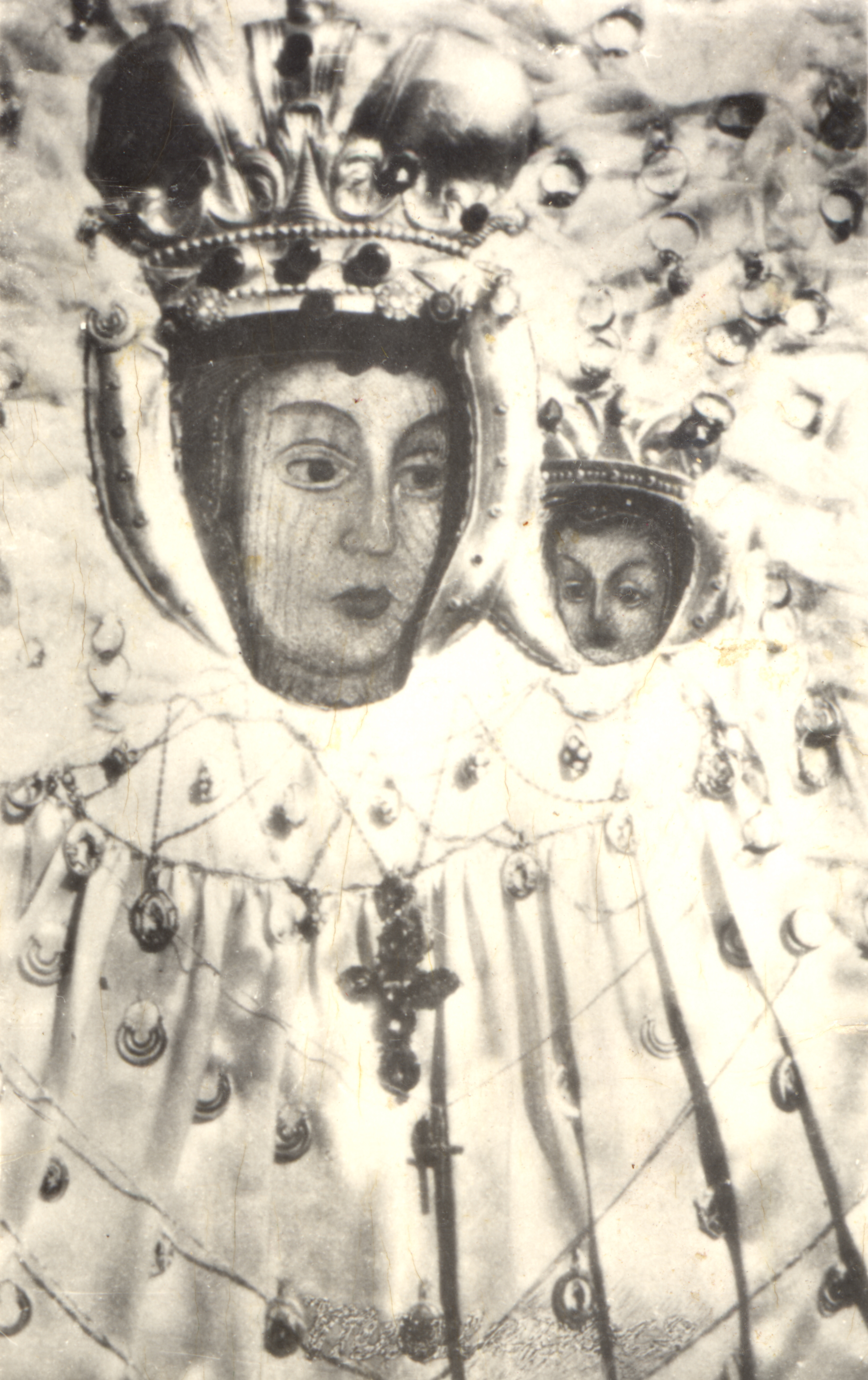 Kópia z originálu ikony namaľovaná v r. 1707. Fotografia z Máriapócs z roku 1972